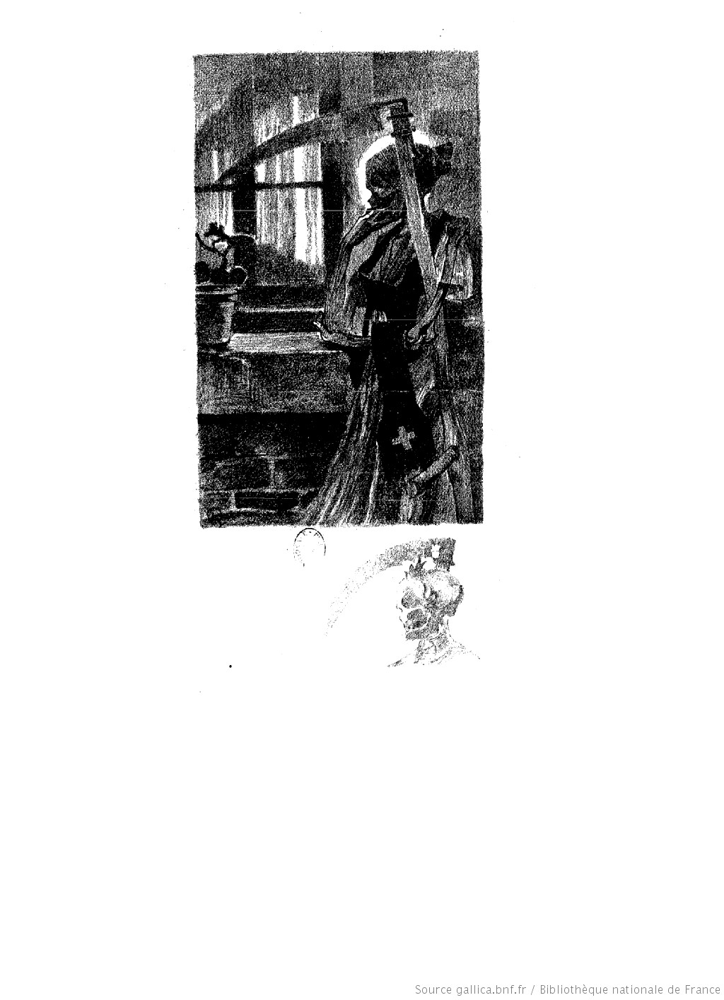 Auguste Donnay illustration pour L'intruse de Maurice Maeterlinck (1862-1949) in Théâtre de Maurice Maeterlinck, illustré par Auguste Donnay, (1862-1921) Date d'édition : 1901-1902 (BNF/Gallica)